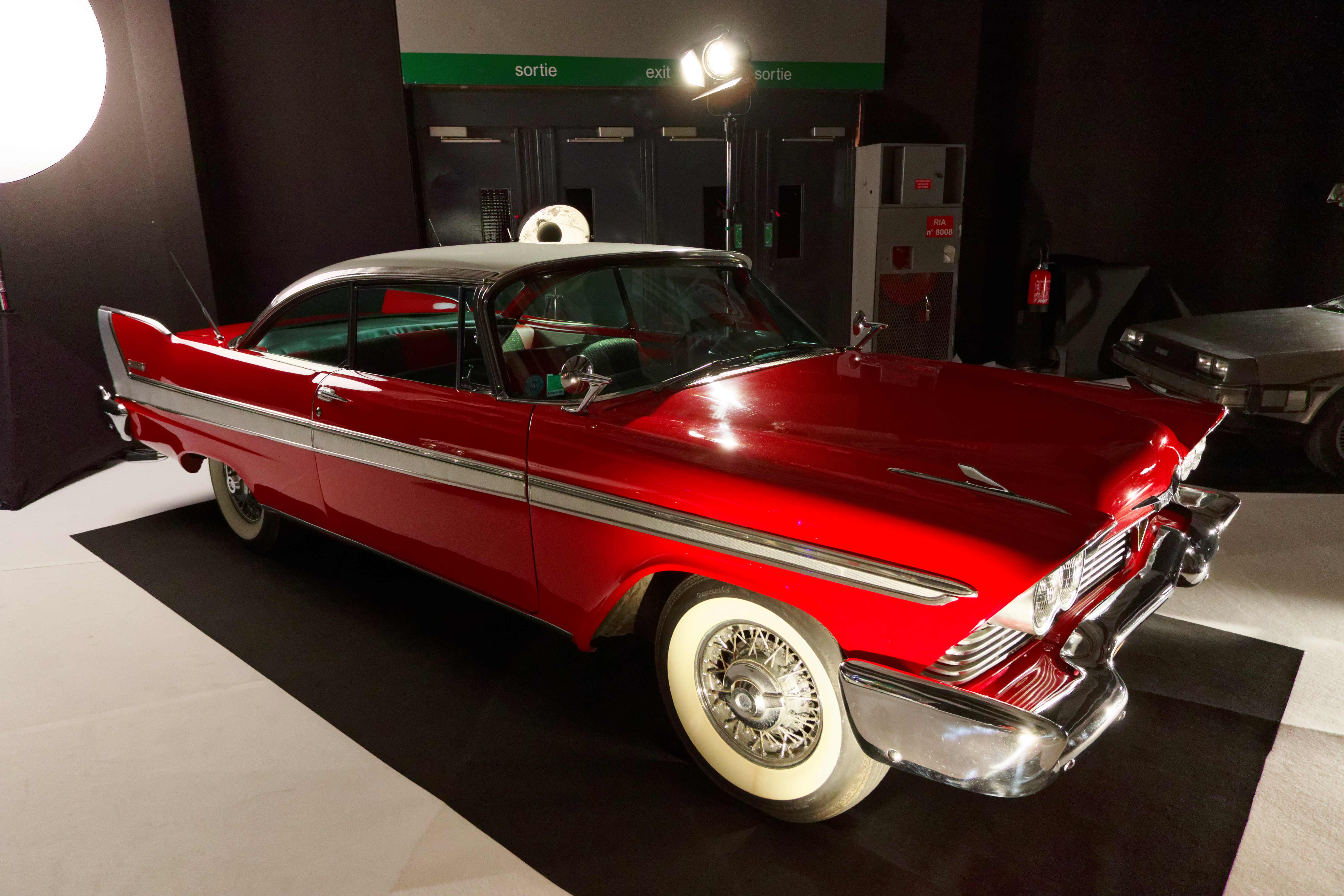 Une Plymouth Fury de 1957 présentée lors du mondial de l'automobile de Paris 2016. Ce modèle de véhicule a été utilisé sur le tournage du film Christine